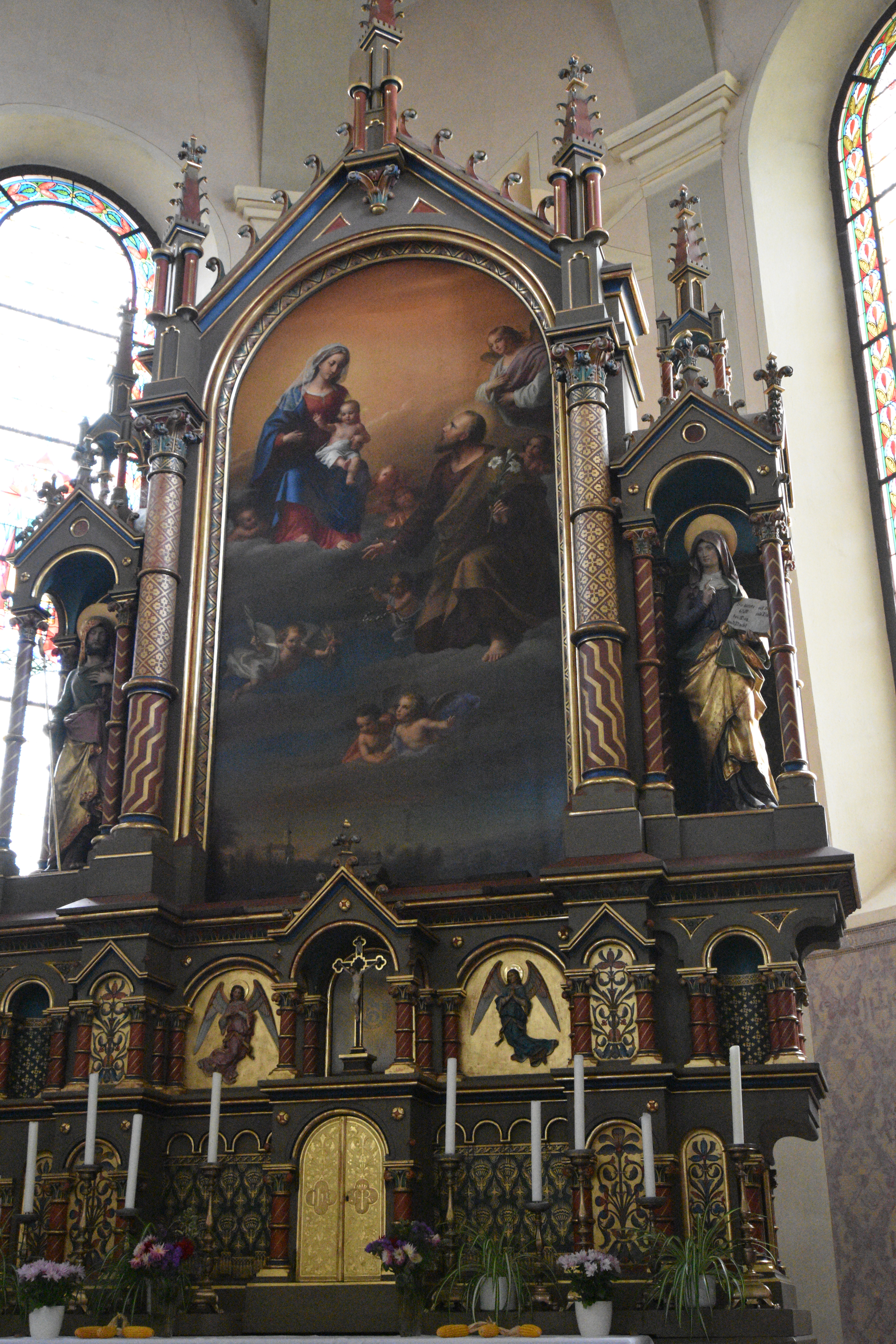 Pfarrkirche Sankt Josef in der Weststeiermark - Interior